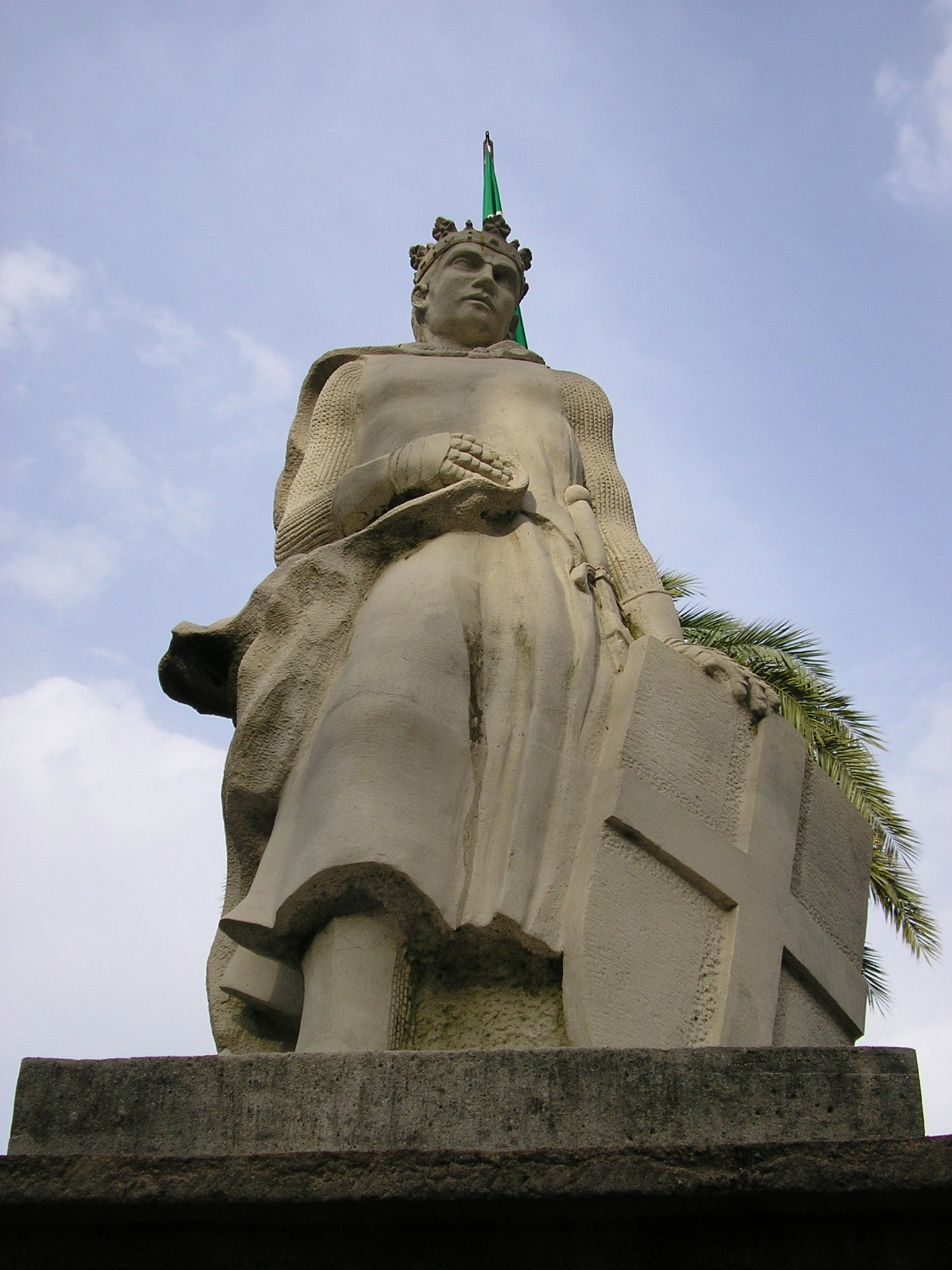 Estatua de Alfonso XI de Castilla situada en la Avenida Blas Infante de Algeciras, Andalucía, España.